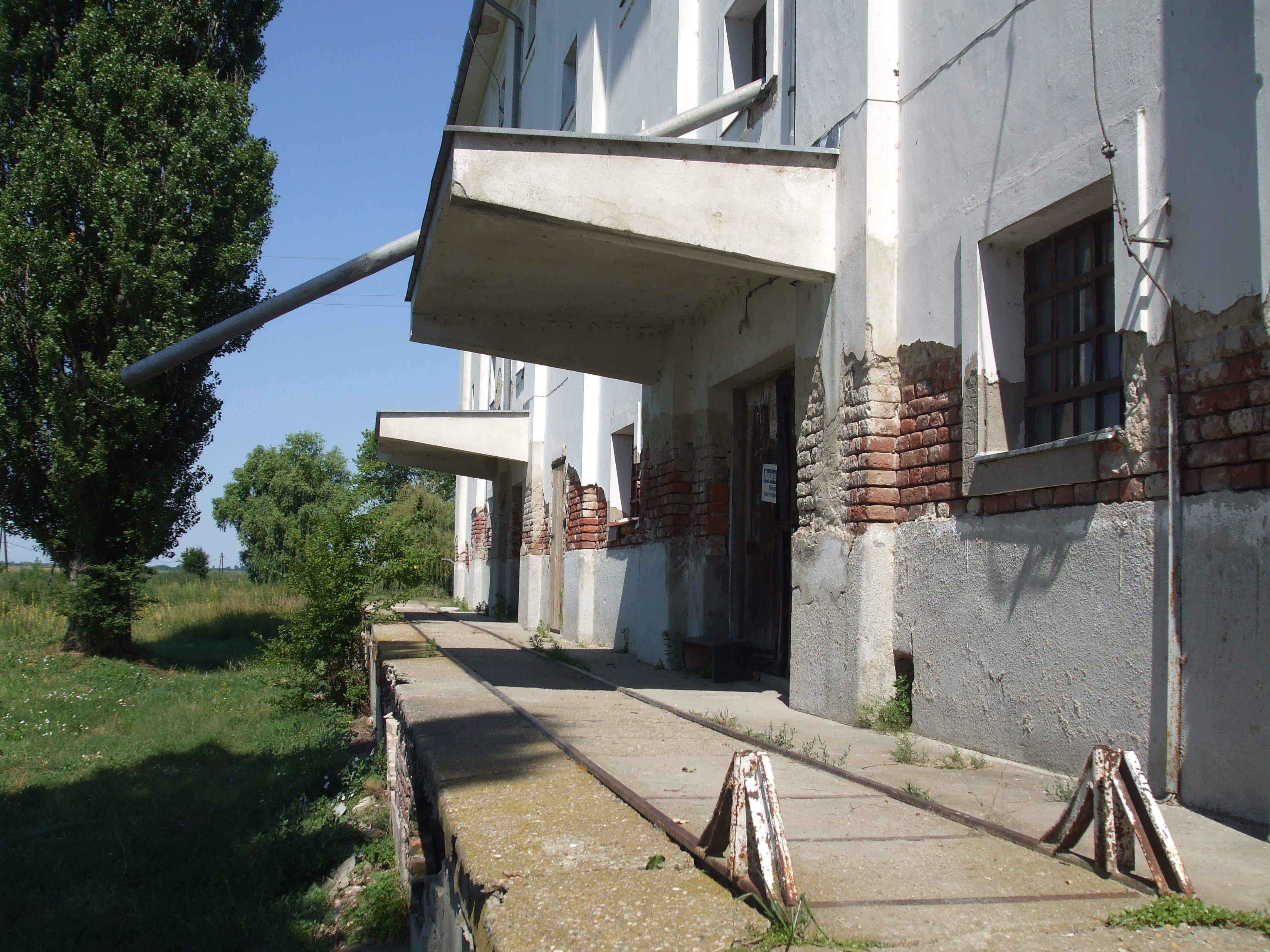 A Hortobágyi Kisvasút raktári rakodóvágánya, mely a felbontott normál nyomtávolságú rakodóvágány oldalrakodóján fut.